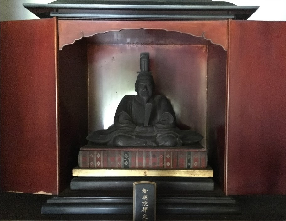 一条家十四代当主、摂政関白左大臣・一条昭良の木像。京都府京都市東山区の東福寺芬陀院所蔵。